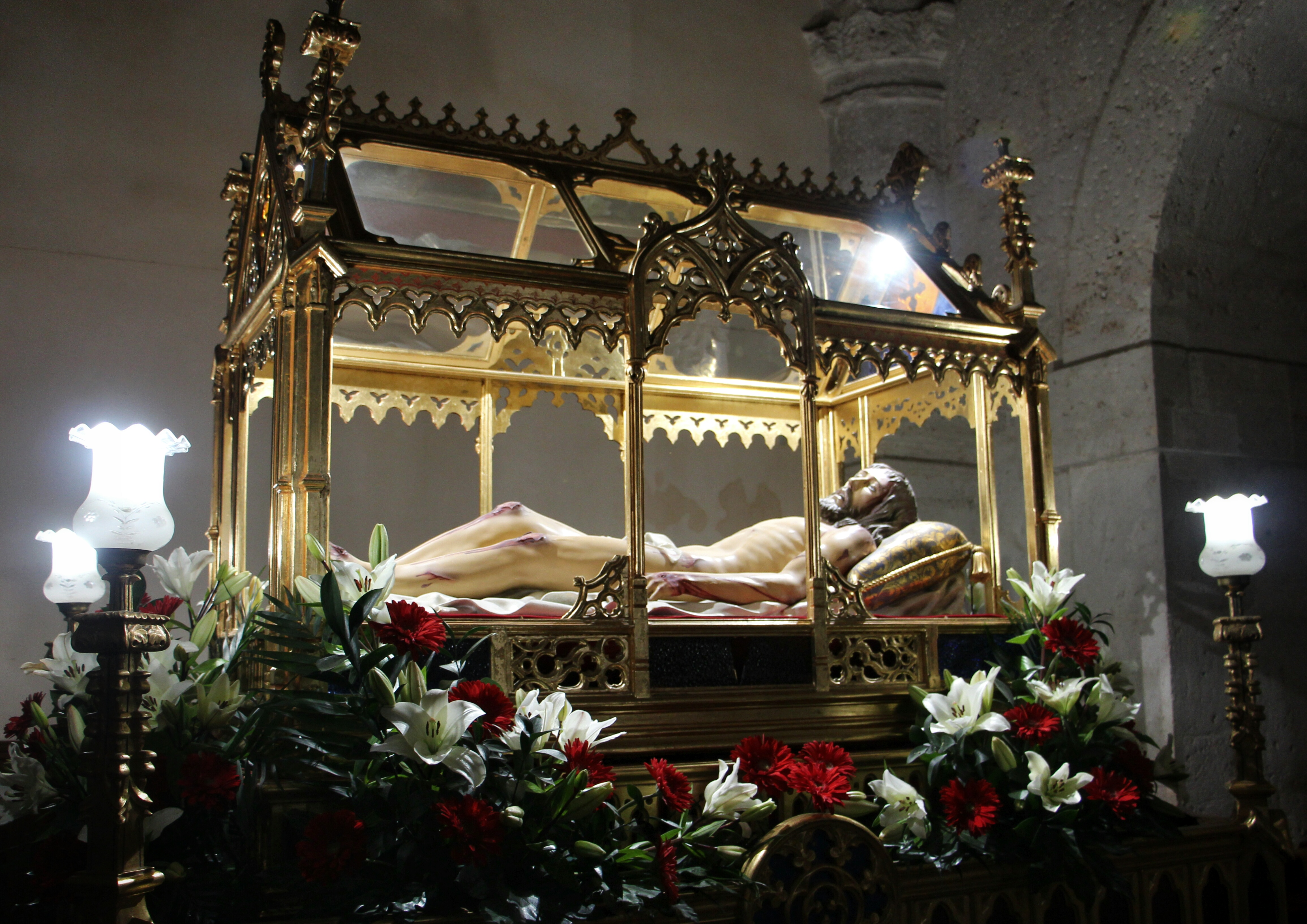 Semana Santa de Ayora - Imagen del sepulcro Viernes Santo por la Noche